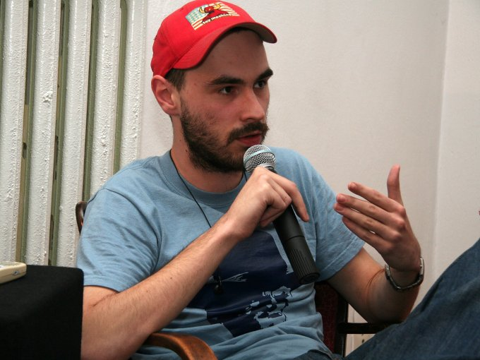 Jakub Żulczyk (b. 1983), a Polish writer.